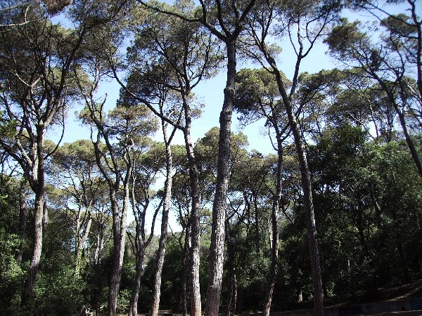 Pineda de pi pinyoner Pinus pinea